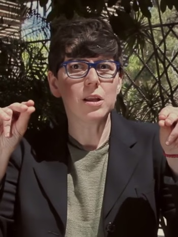 Pilar Lima, 2015.